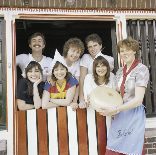 De Britse groep Prima Donna tijdens een fotosessie voor het Eurovisie Songfestival 1980